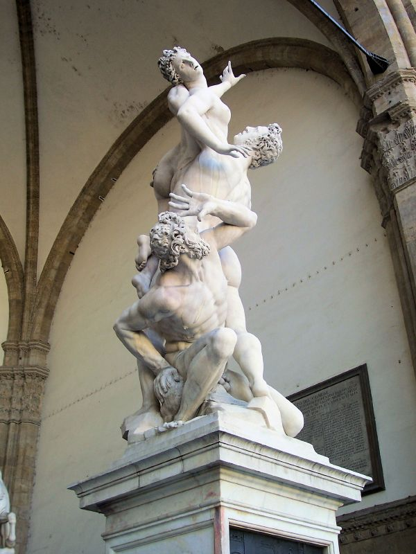 Piazza Della Signoria, Firenze, Italia